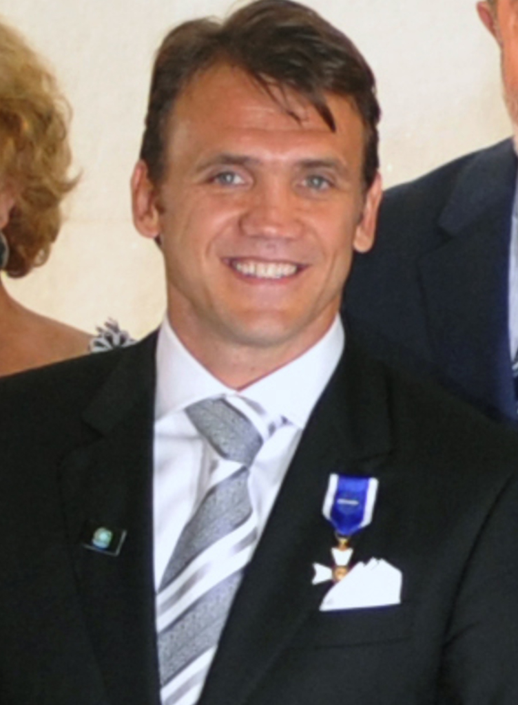 O jogador Petkovic após receber a Ordem do Rio Branco.